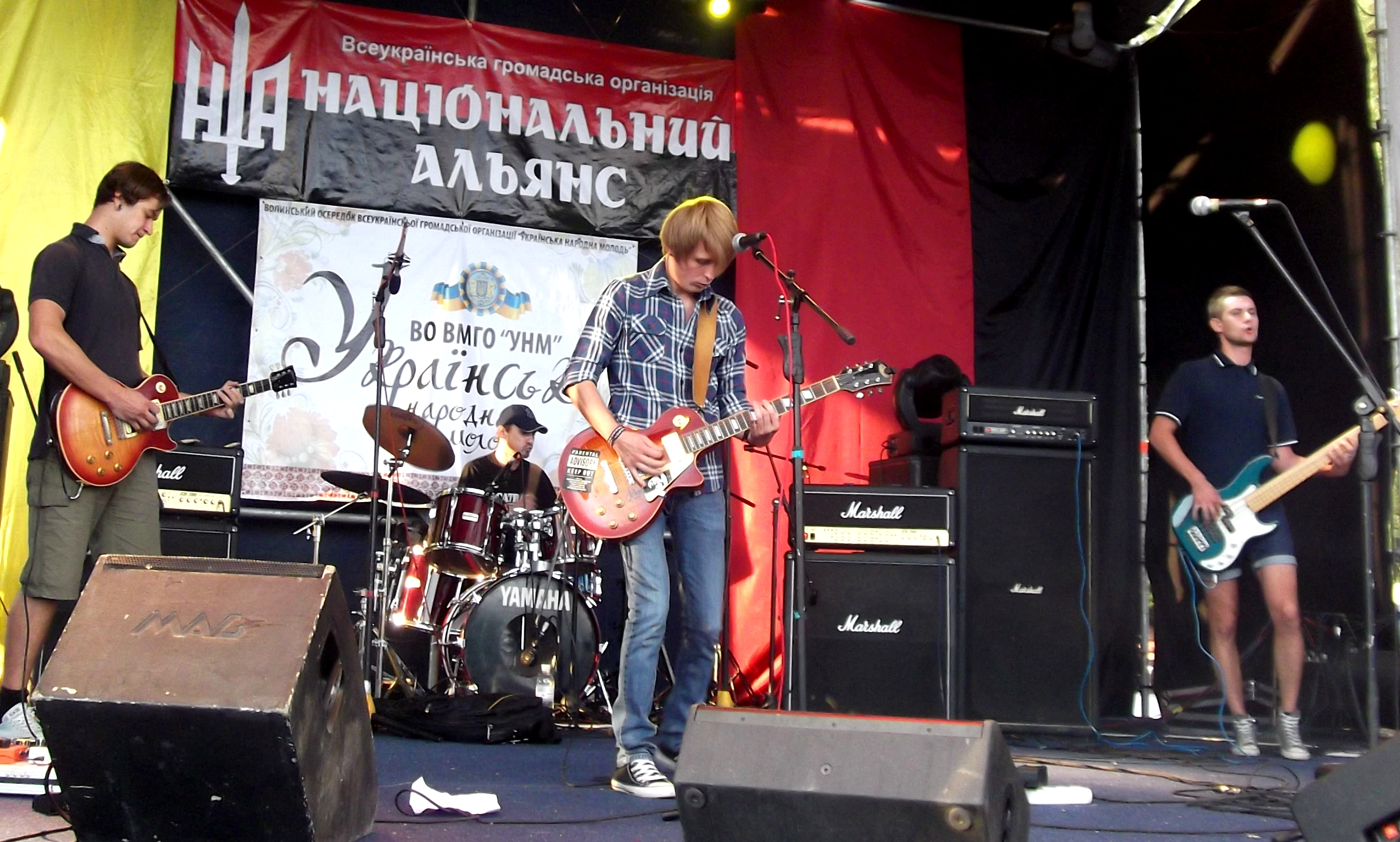 Безодня: гурт Безодня, Бандерштат, 2011